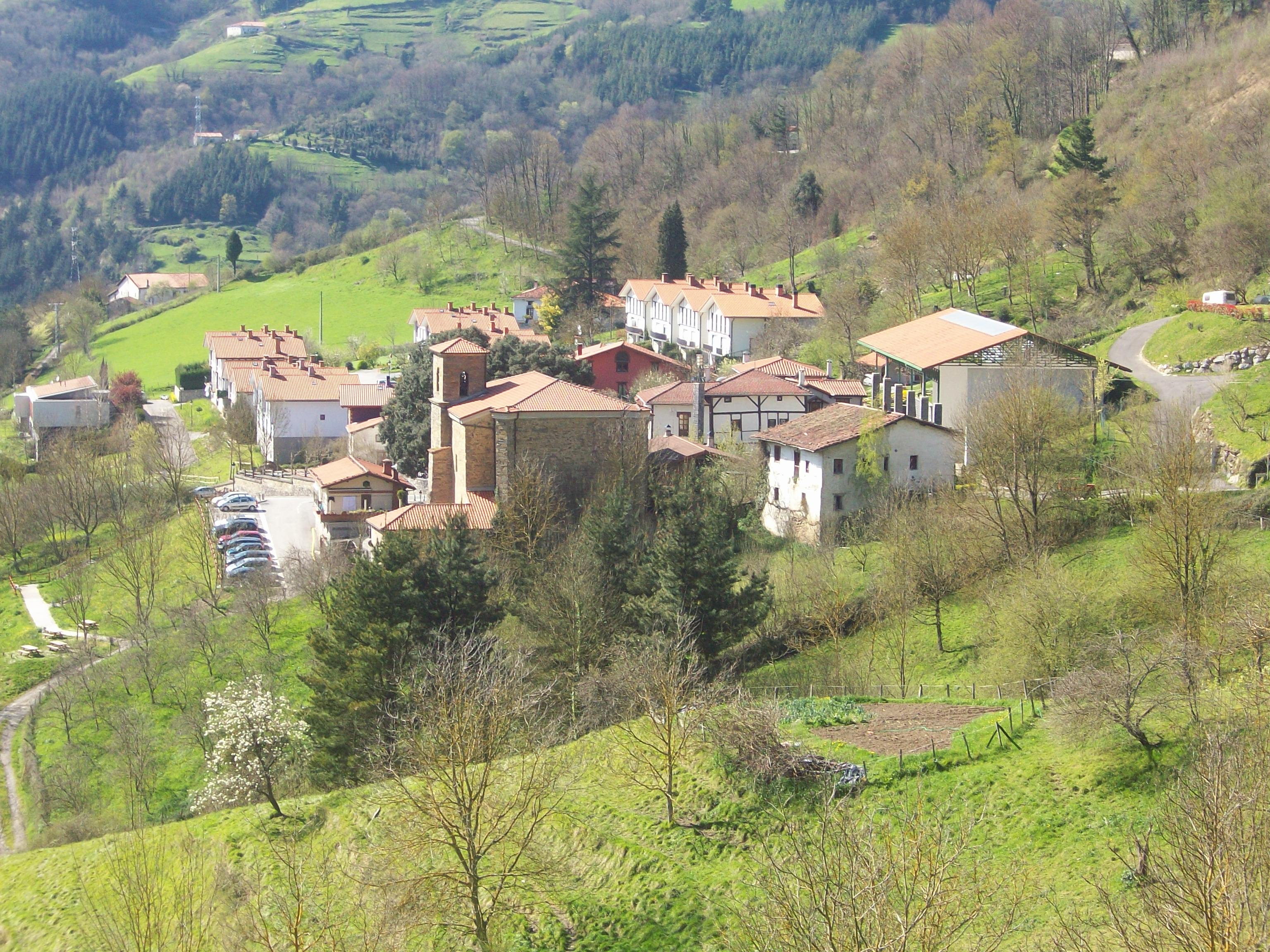 Altzaga, Goierri. Gipuzkoa, Euskal Herria. Altzaga, Goierri. Guipuscoa, Basque Country.